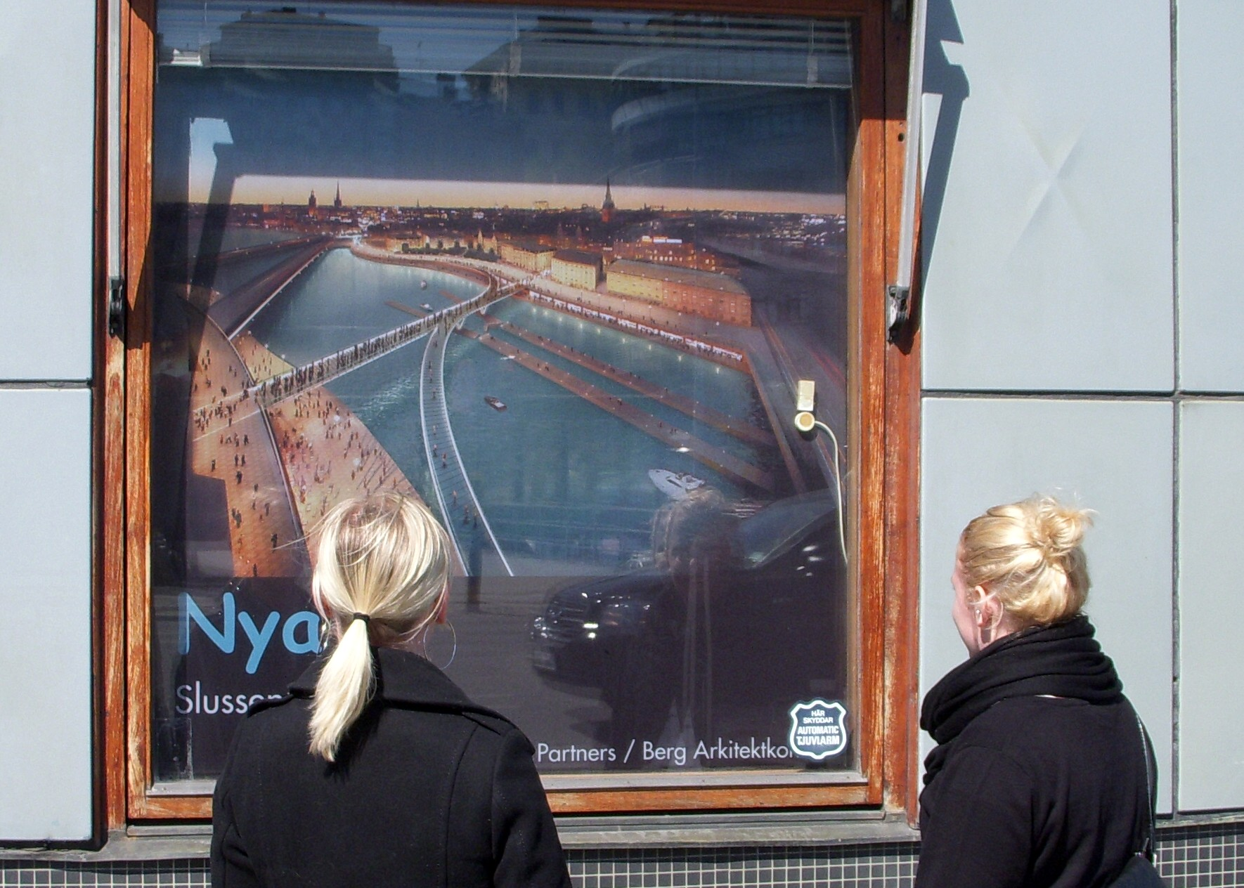 Slussen i Stockholm, "Nya Slussen" betraktas i skyltfönster